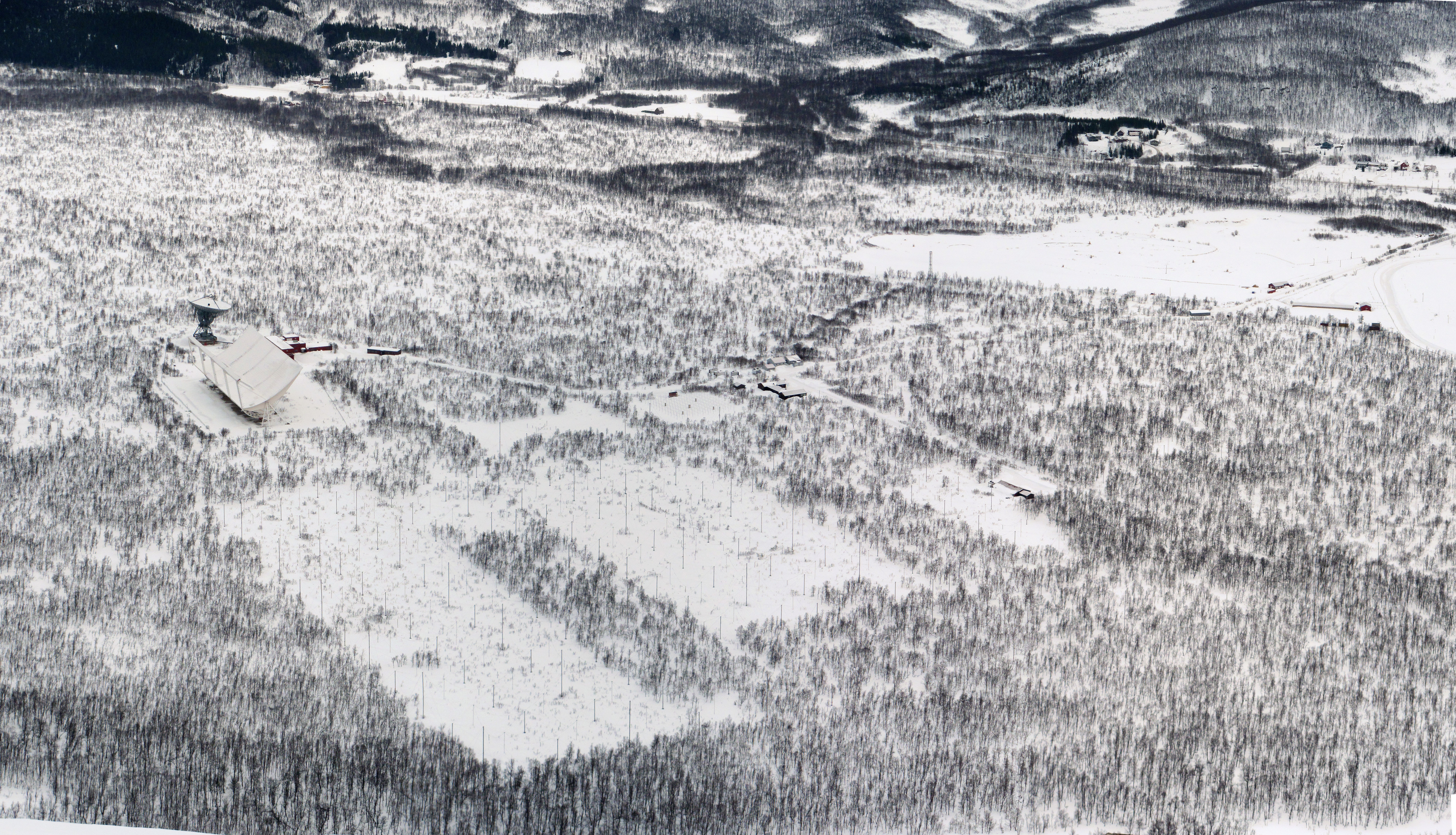 Das Areal der Forschungsstation Ramfjordheide im tiefen Winter von Nordwesten her gesehen